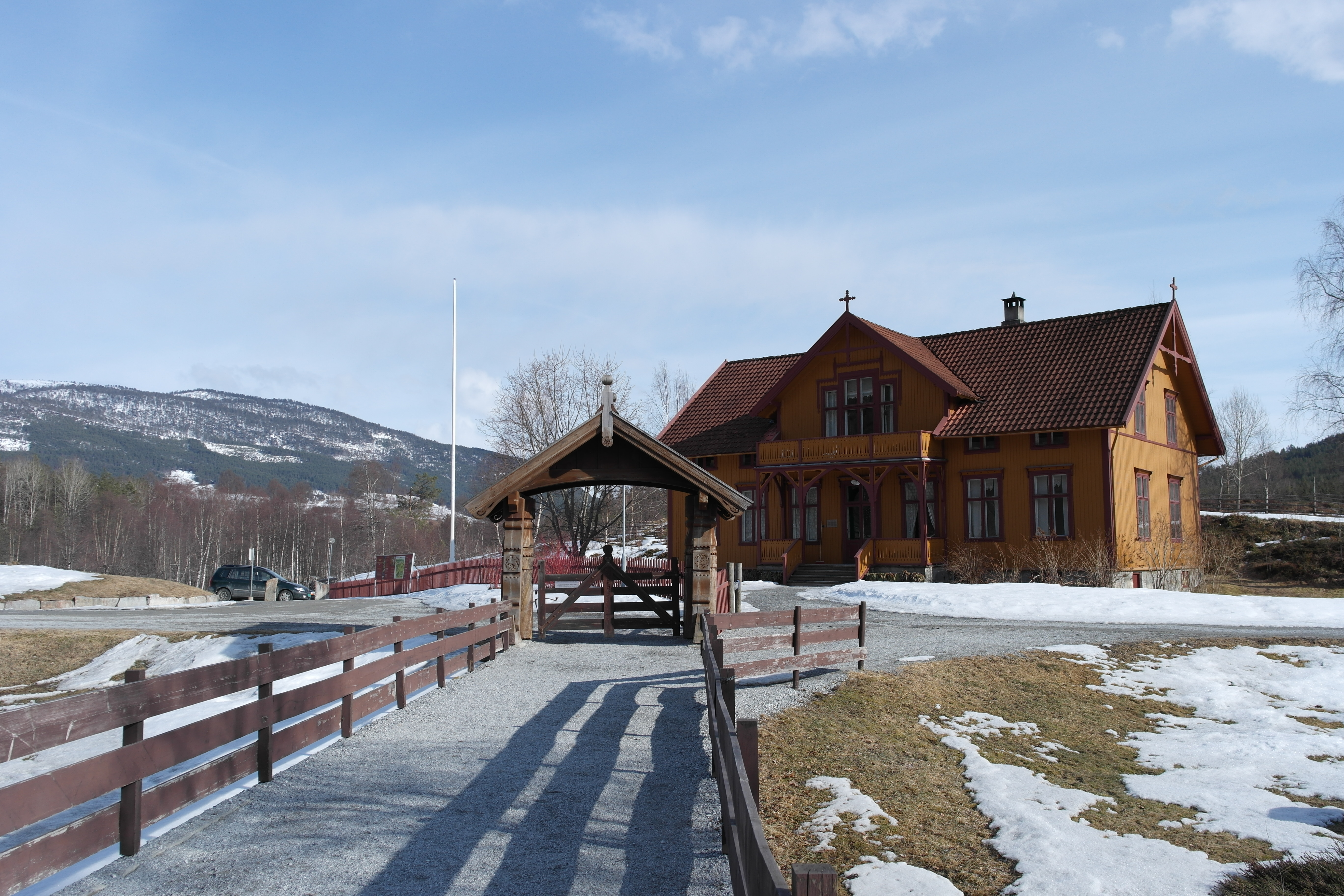 Helgeheimstova og inngongspartiet